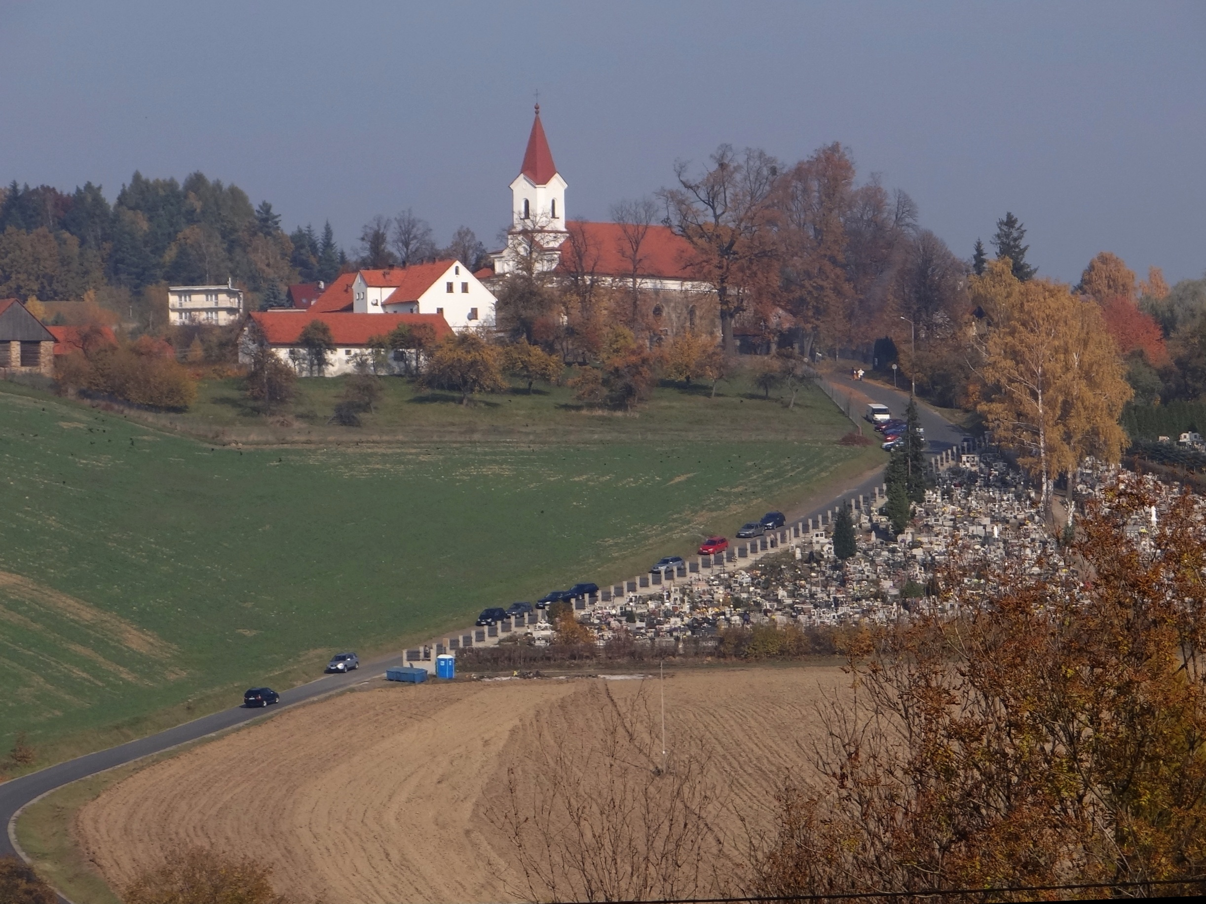 Mucharz. Widok na kościół św. Wojciecha